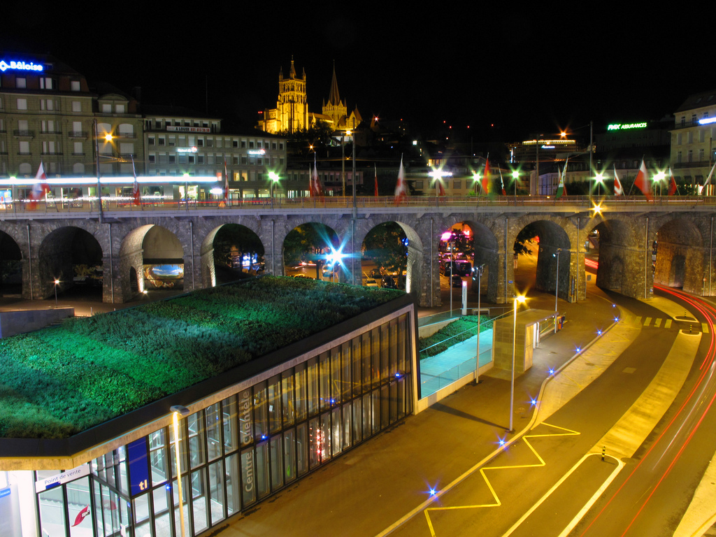 Le Flon (Lausanne) a été réaménagé pour le nouveau schéma des TL, « R08 ».